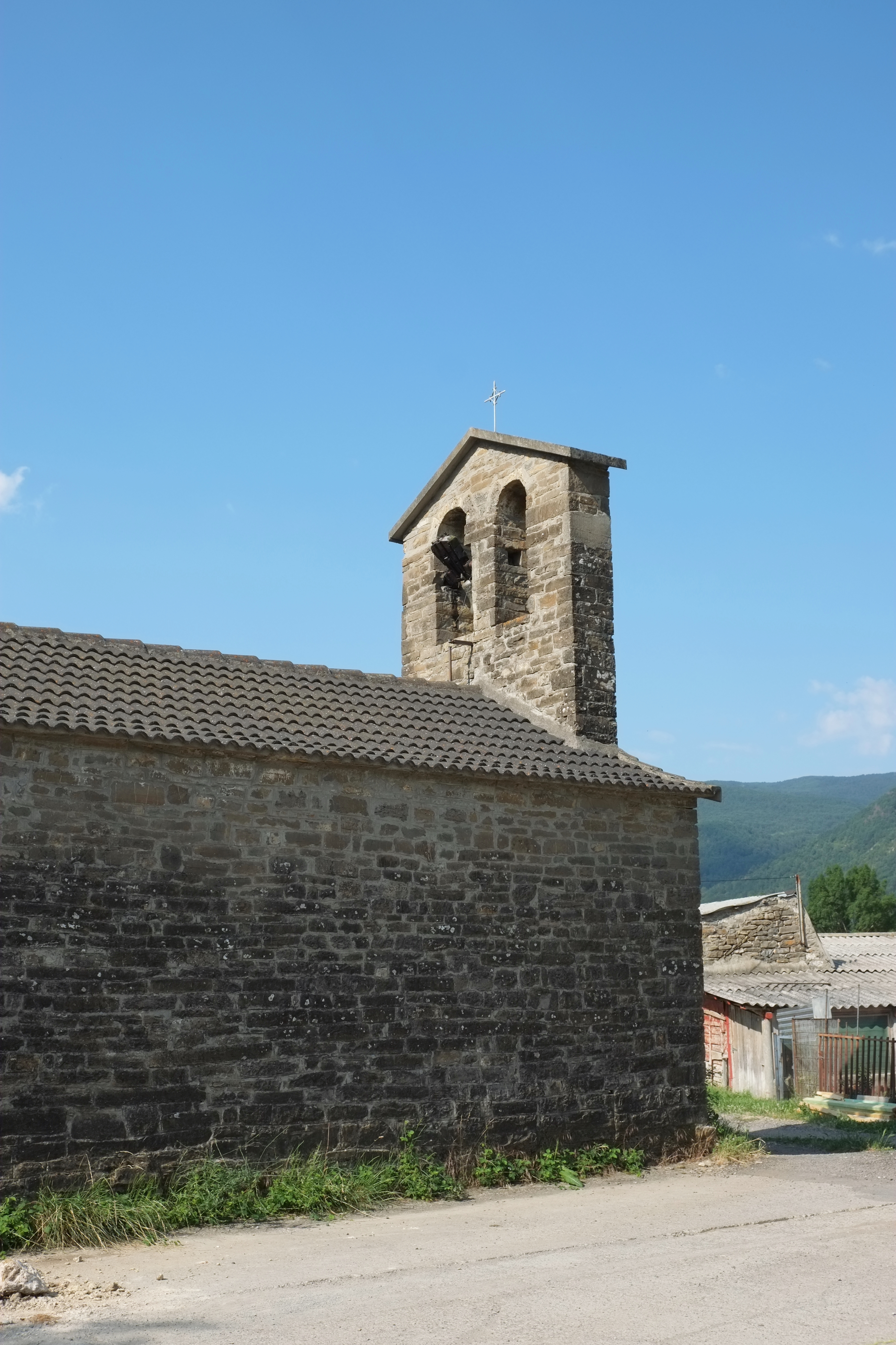 Kirche San Esteban in Orós Alto in der Provinz Huesca in der Region Aragonien (Spanien)